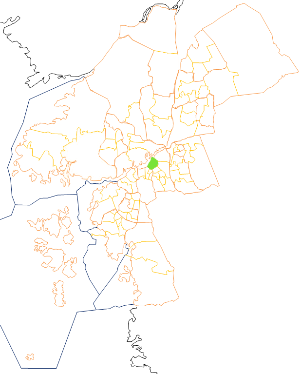 Karta som visar primärområdes belägenhet i Göteborg